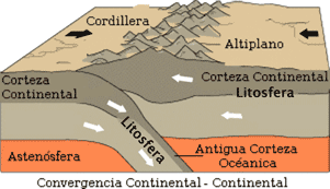 Imagen sacada de: y traducida. El original es dominio público.